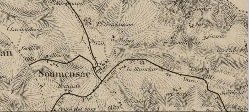 Carte cantonale de Duras (extrait).